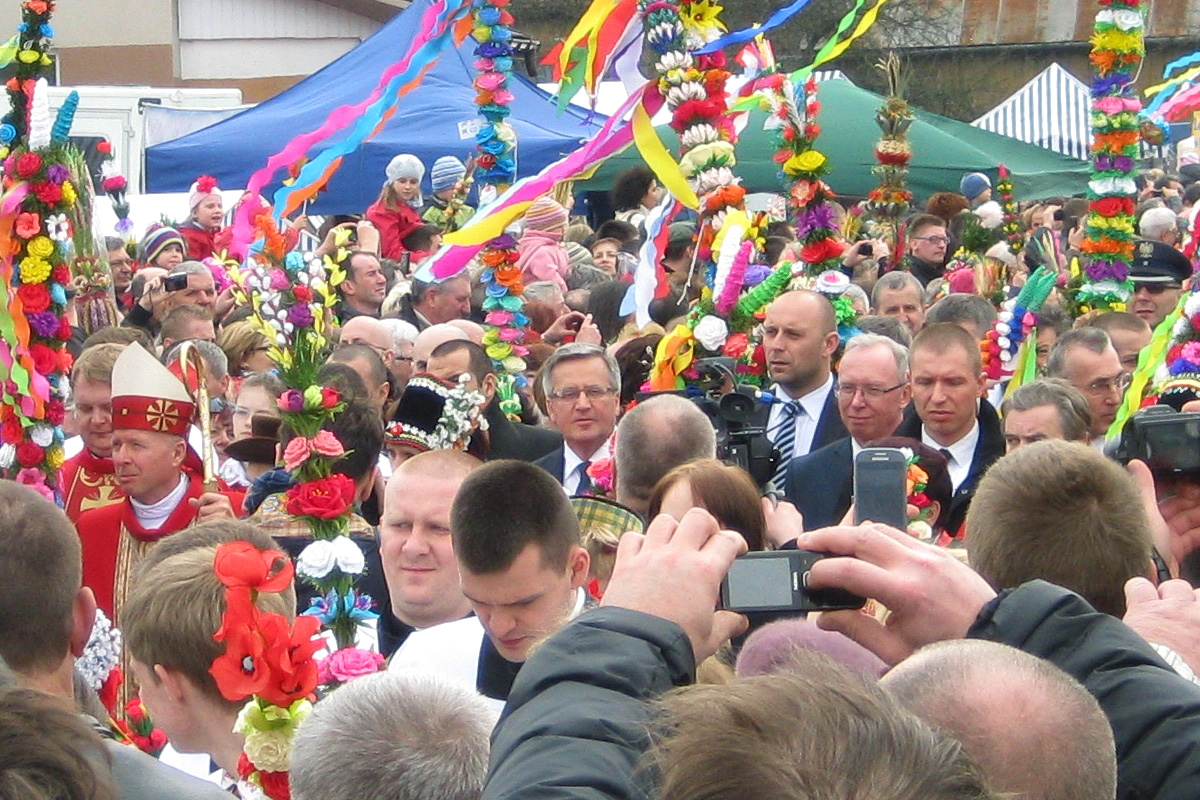 Prezydent Bronisław Komorowski - Niedziela Palmowa. Łyse 2014r.